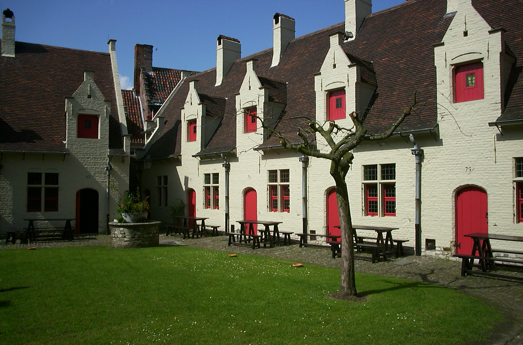 Ghent, Huis van Alijn